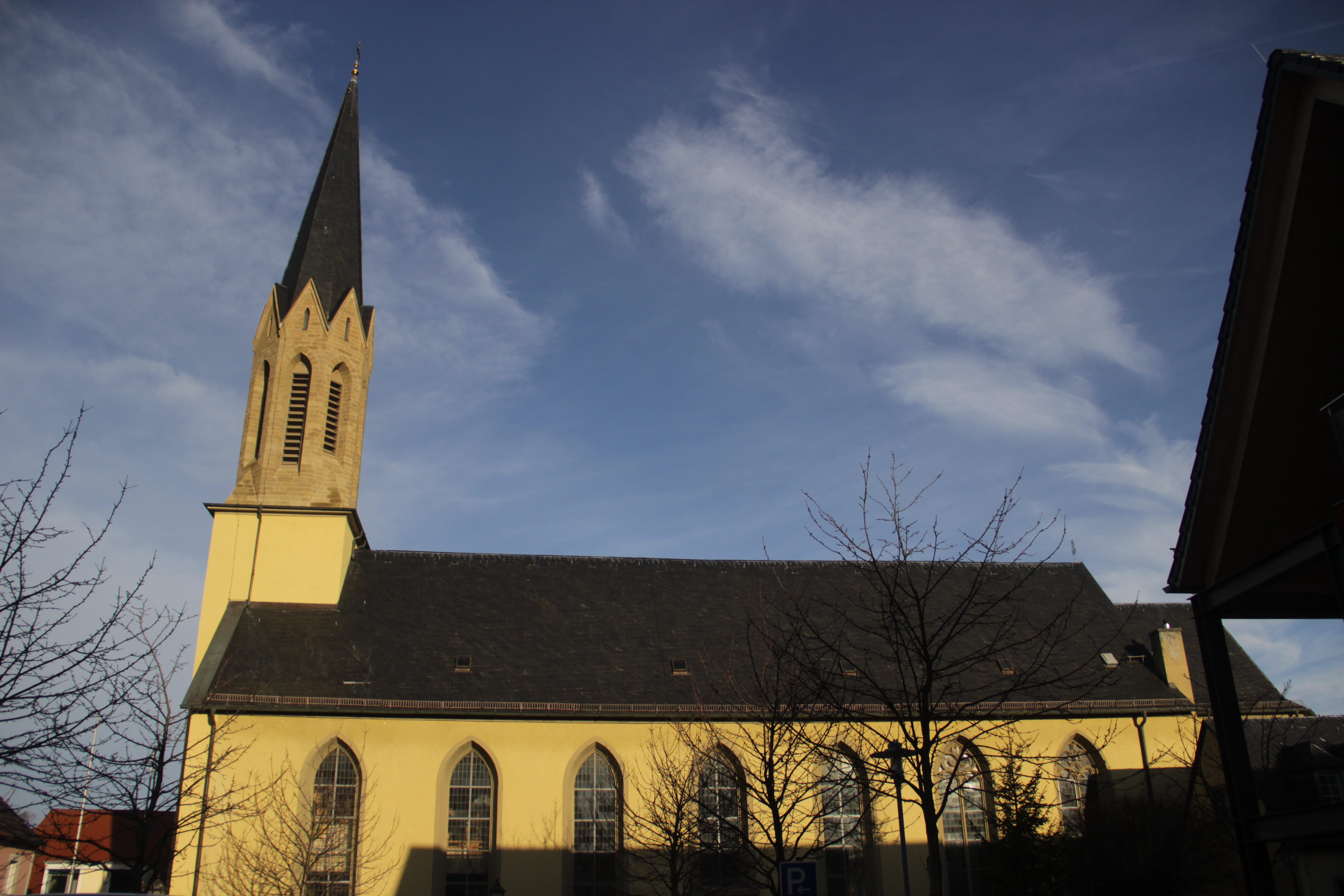 Saalbau mit eingezogenem Chor und westlichem Fassadenturm mit Spitzhelm, im Kern mittelalterlich, Umbau 1613, Langhauserweiterung 1860, mit Ausstattung